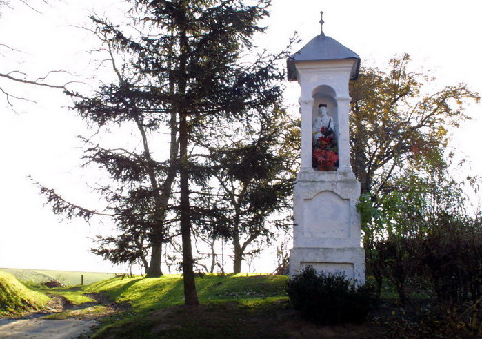 Kapliczka ze św. Janem Nepoumucenem w Nowosielcach. Zdjęcie mzopw